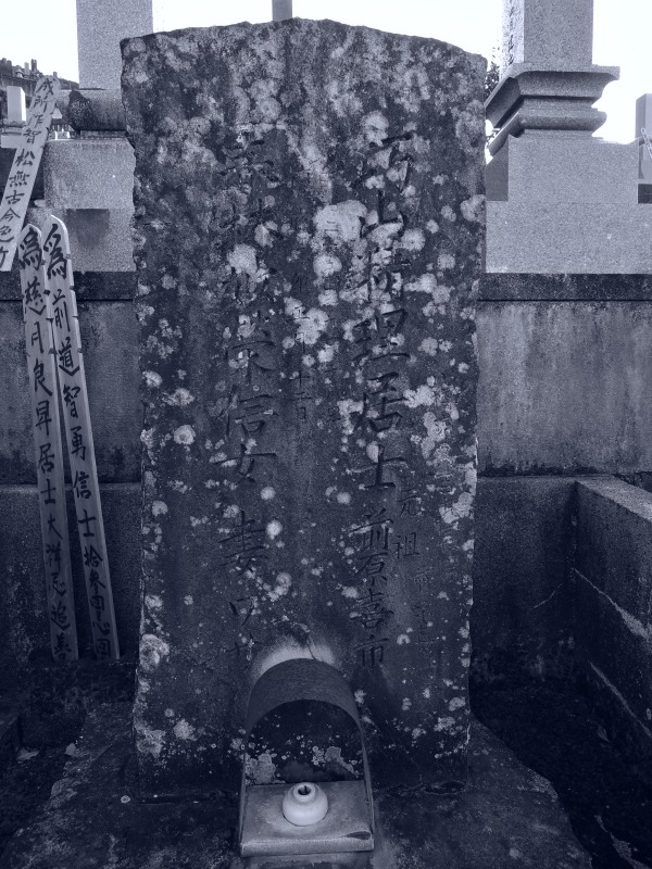 前原巧山 夫妻の墓画像